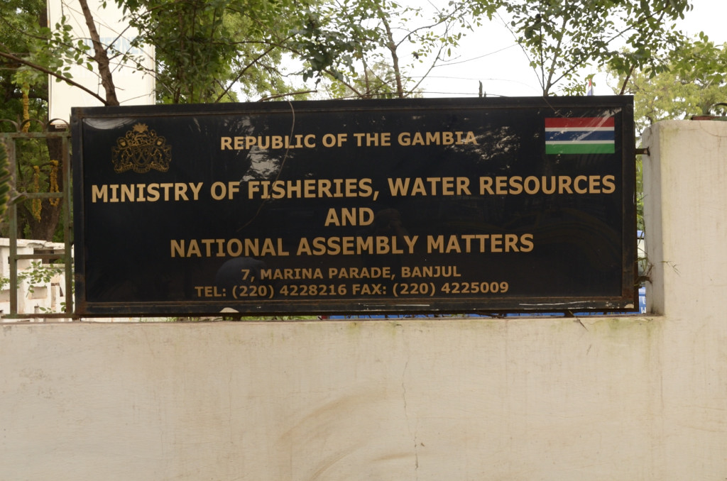 Gambia Ministry